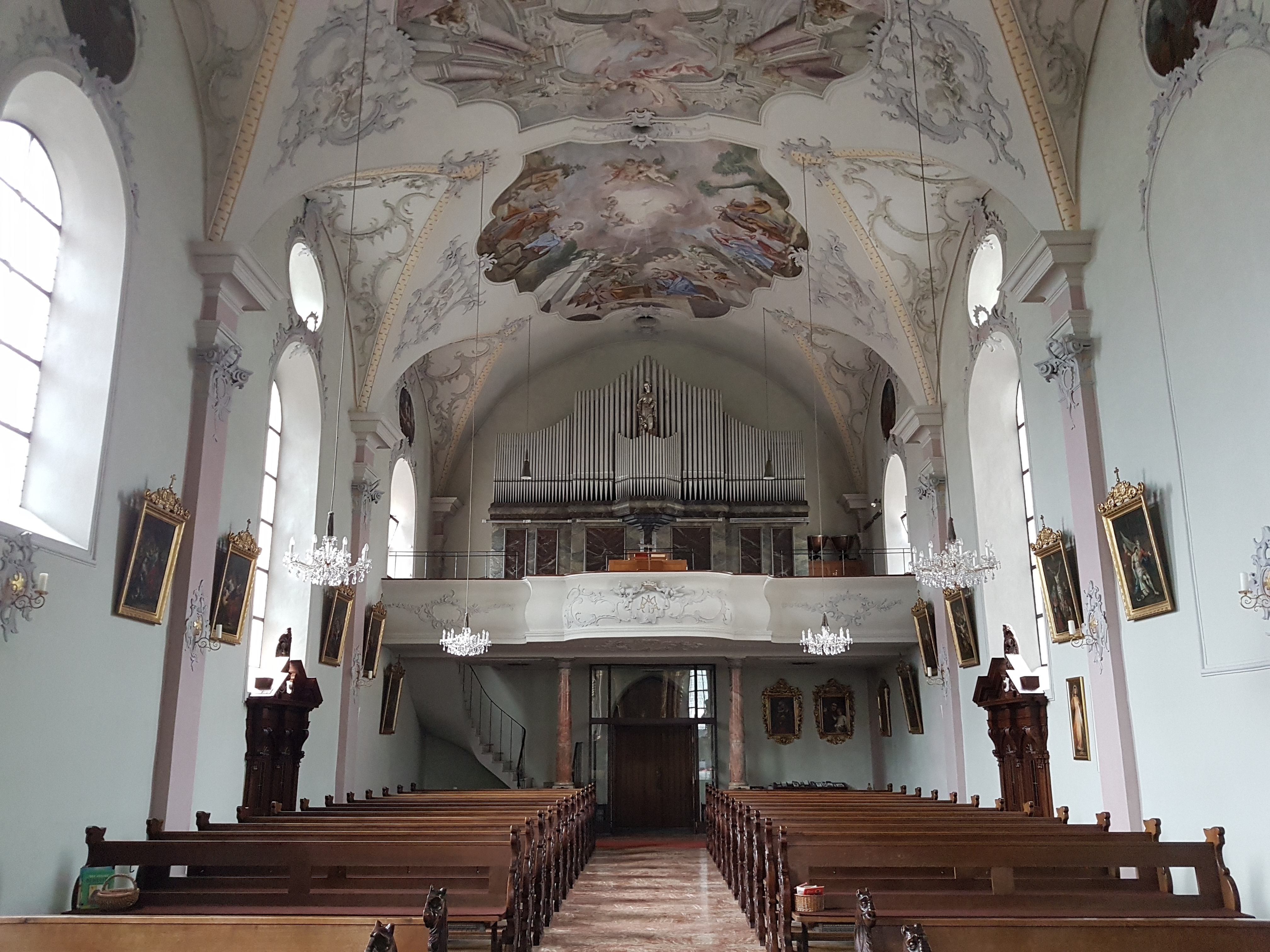 Pfarrkirche Unserer Lieben Frau Vermählung, Brixlegg